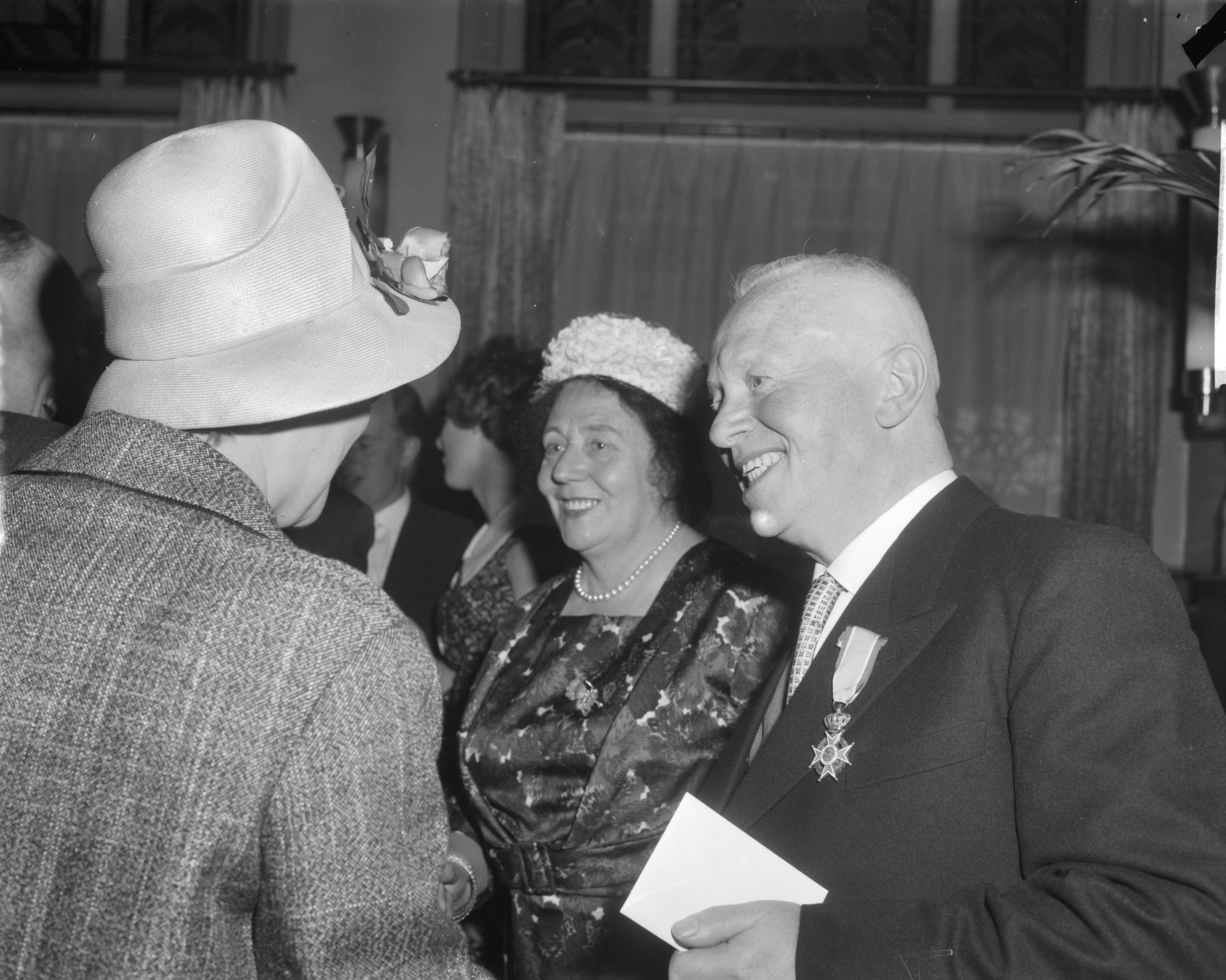 Frans Stroethoff tijdens een bijeenkomst waar zijn "zilveren" jubileum bij Tot Heil des Volks wordt gevierd